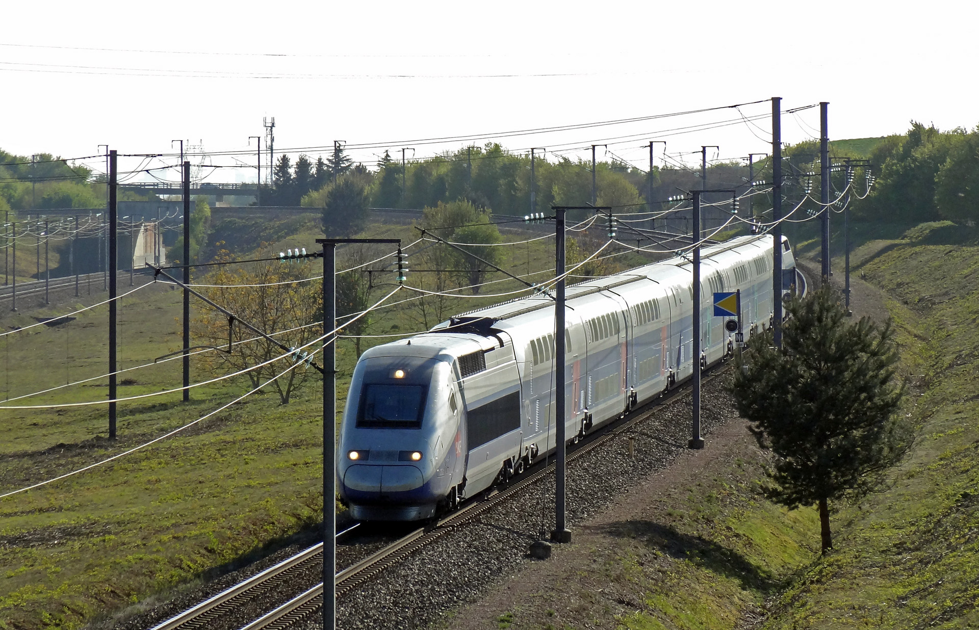 Une rame TGV Duplex quitte la LGV Interconnexion Est (triangle de Vémars) pour s'engager sur la LGV Nord en direction de Lille, à Moussy-le-Neuf (Seine-et-Marne), France.